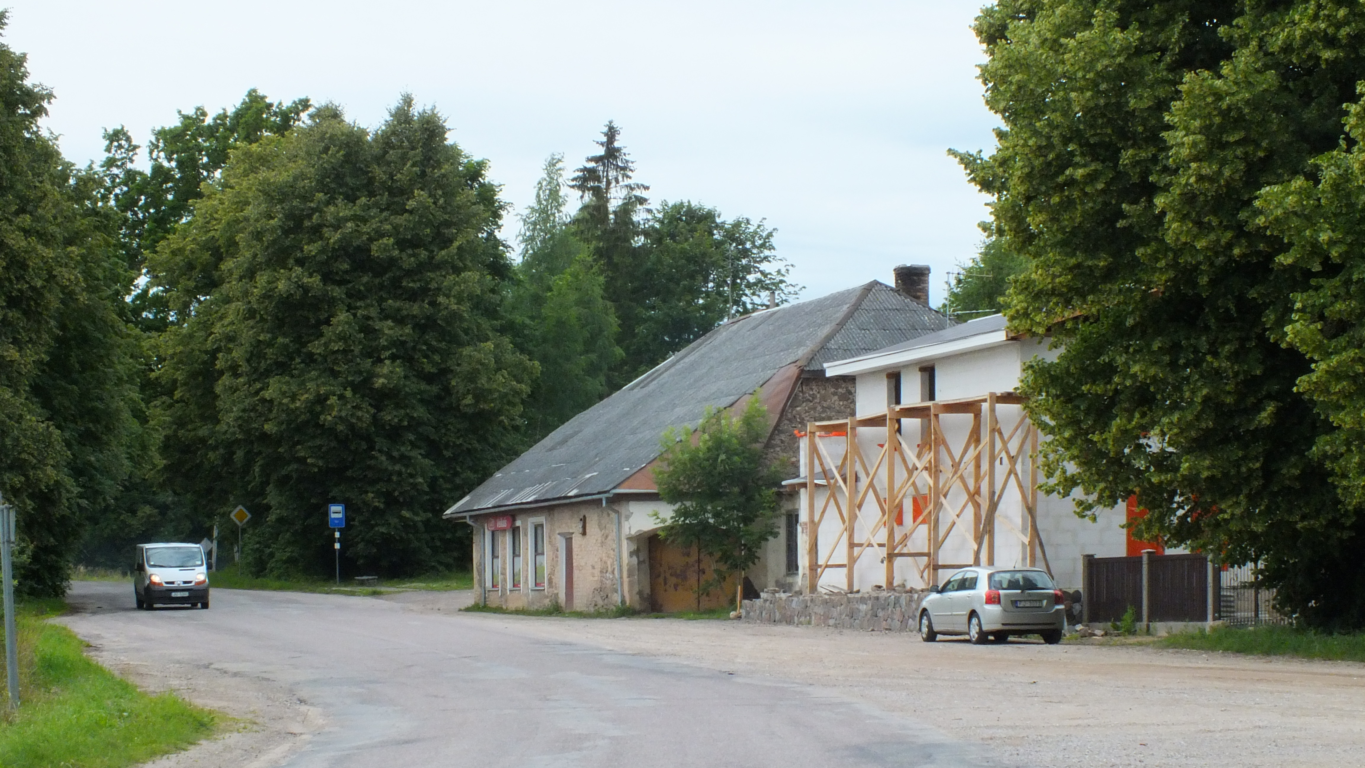 Sātu veikals